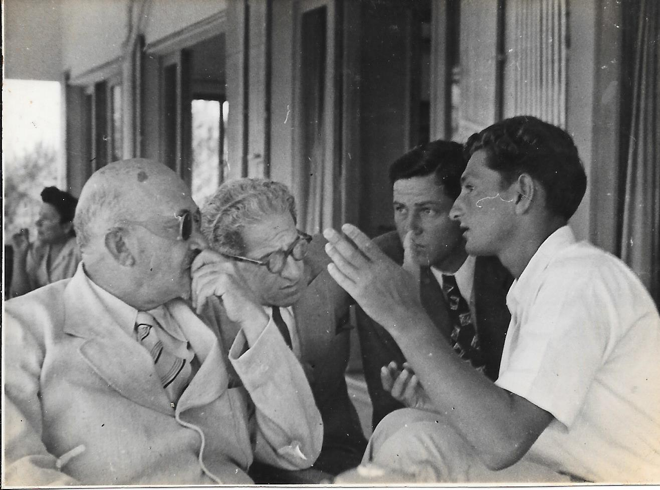 ינאי מפקד הפלי"ם מתאר לחיים וייצמן את הבאת ספינות המעפילים